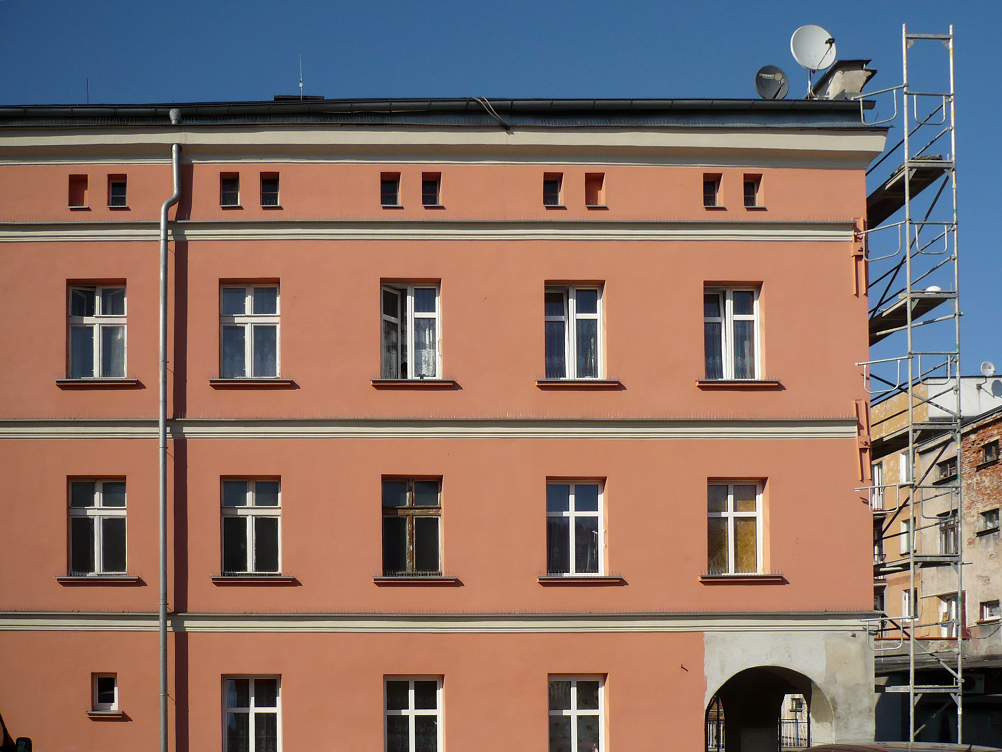 Nowa Ruda, ul. Łukowa 10 - dom, XIX w. - widok z boku (zabytek nr A/941/1565 z 16.03.1966)